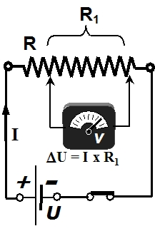 Prikaz pada napona